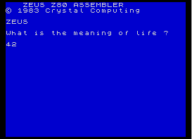 "Пасхальное яйцо" в ассемблере Zeus Z80 Assembler (c) 1983 Crystal Computing